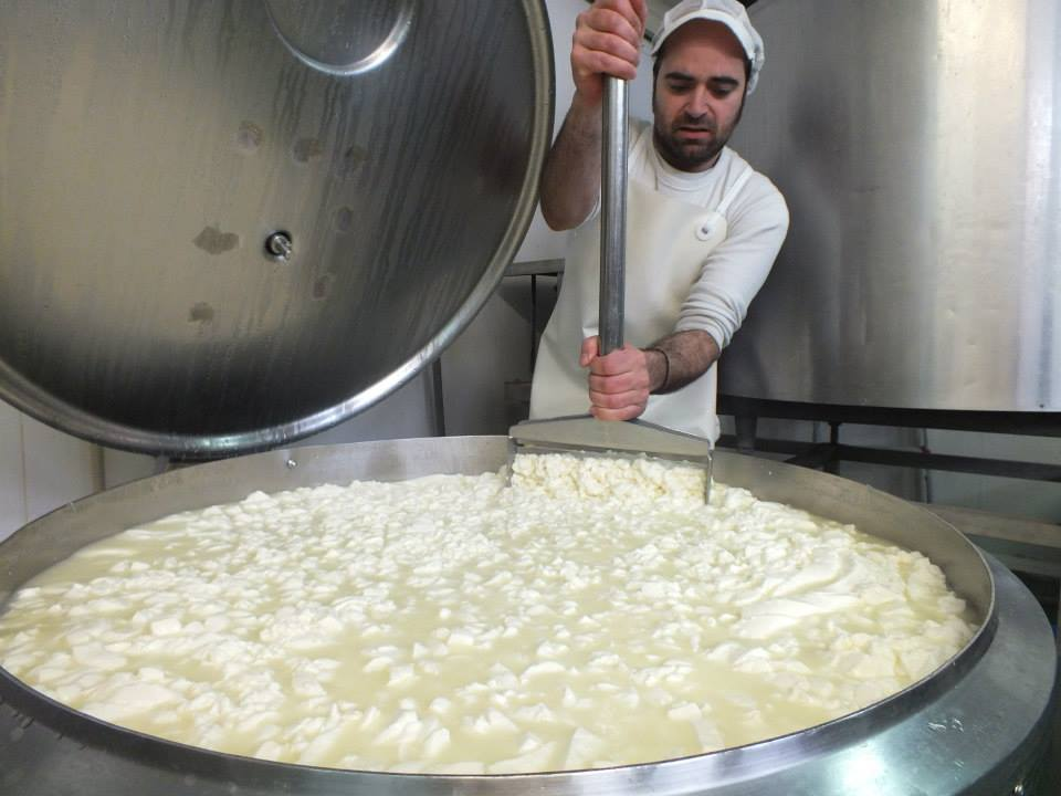 elaboració de formatge artesà